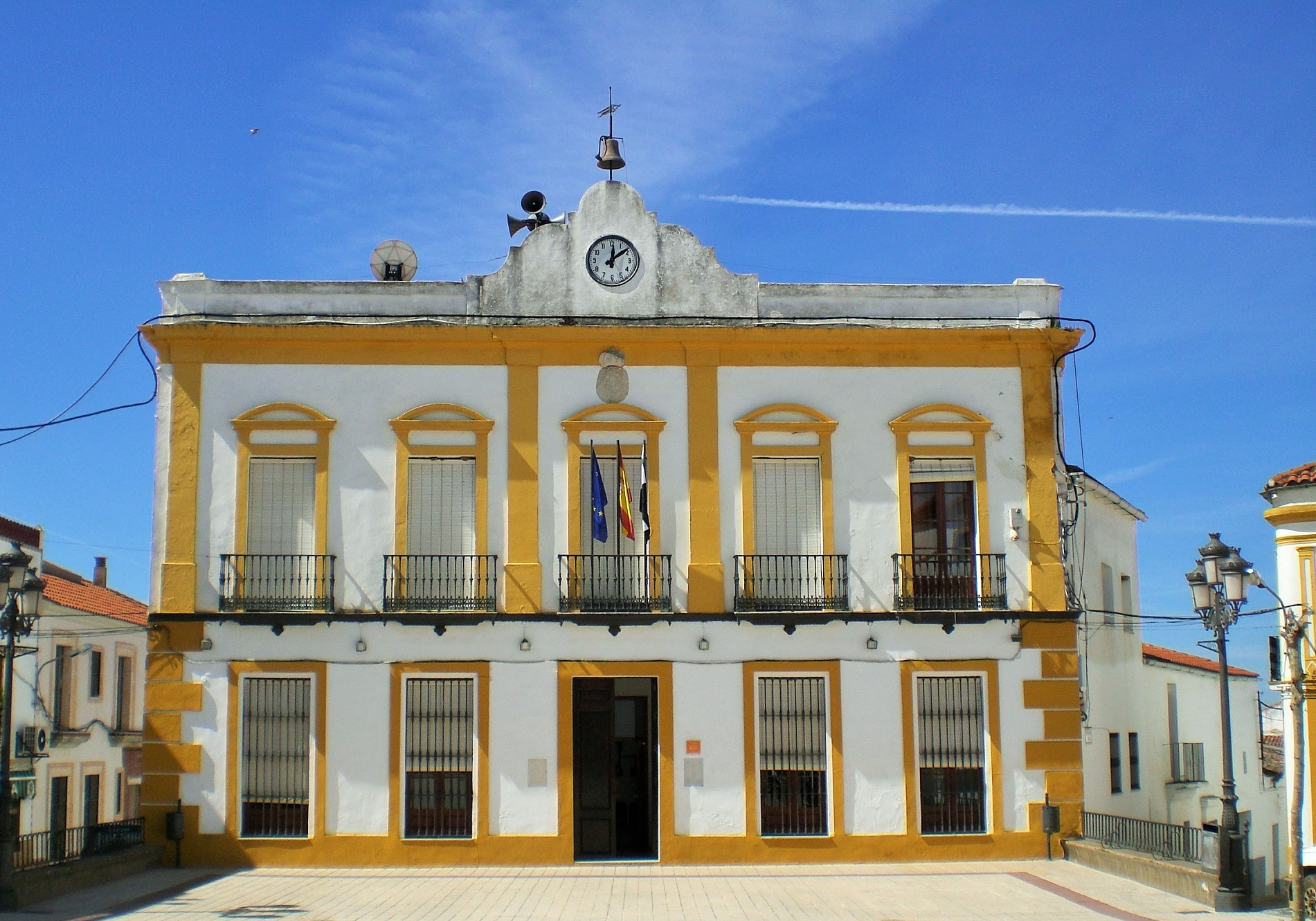 Ayuntamiento (2)